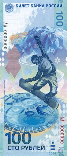 Памятная банкнота 100 рублей, посвящённая Олимпийским играм в Сочи 2014